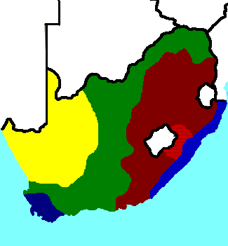 Eigen kaart, bron Zuidelijk Afrika , Geschiedenis, kunst en kultuur in Zuid-Afrika, Namibië, Lesoto en Swaziland